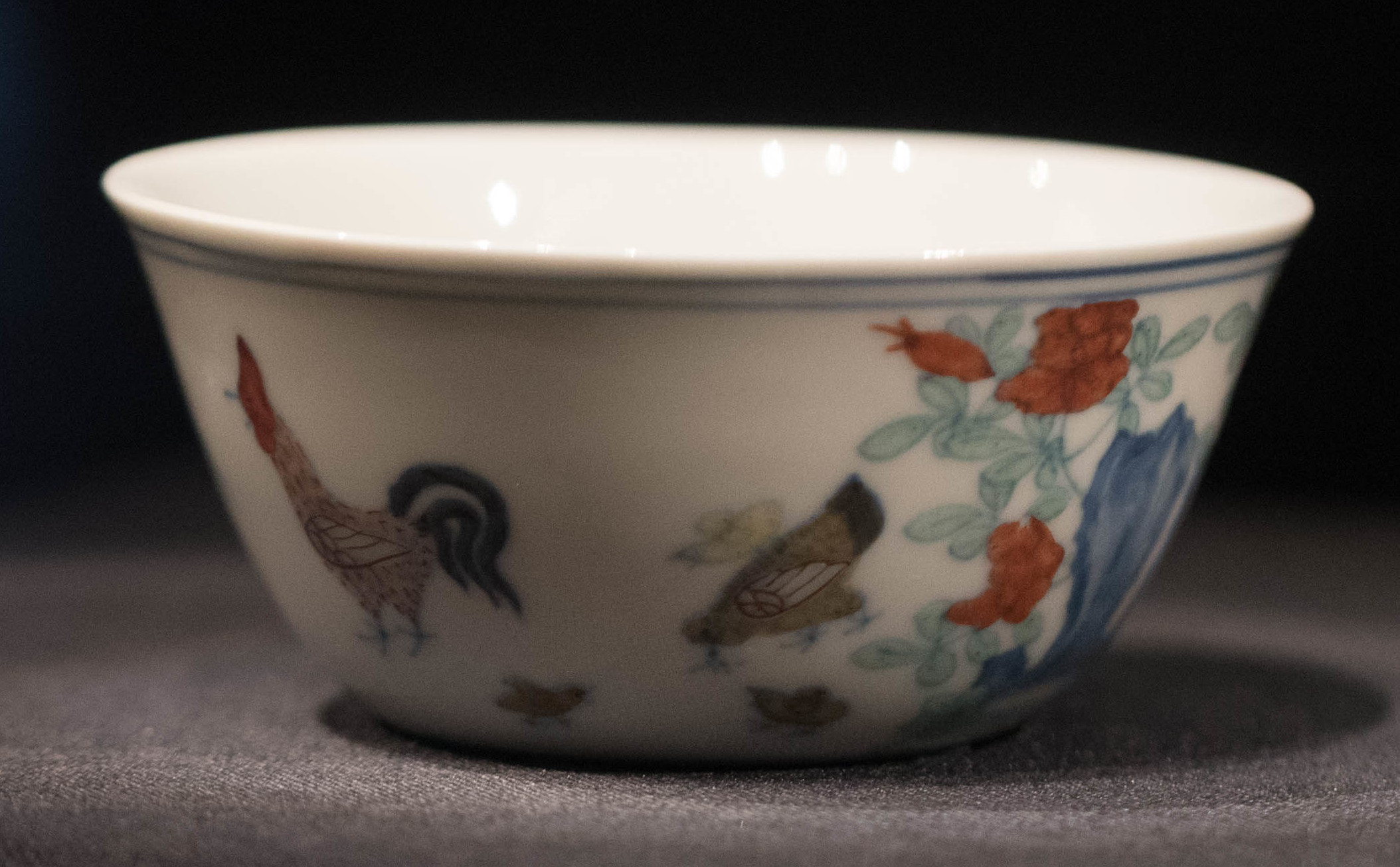 成化斗彩鸡缸杯